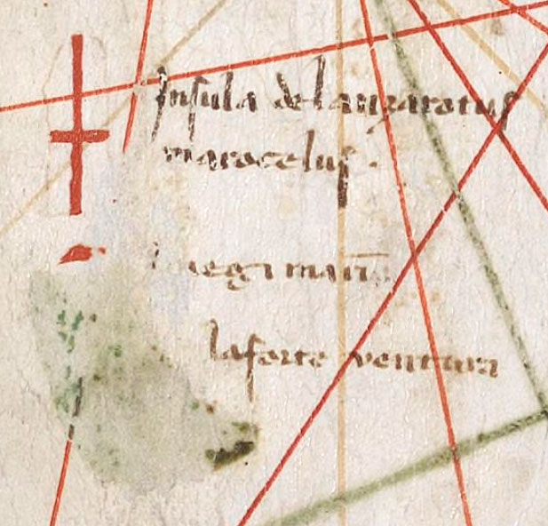 Ligure: Detaggio de l'isoa de Lanzarotus inta mappa do 1339 de l'Angelin Dulcert, conservâ presso a Biblioteca Naçionâ de França, digitalizzâ e reiza disponibbile presso o scito d'a mæxima.